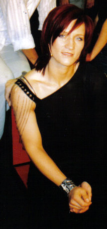 Iwona Guzowska.